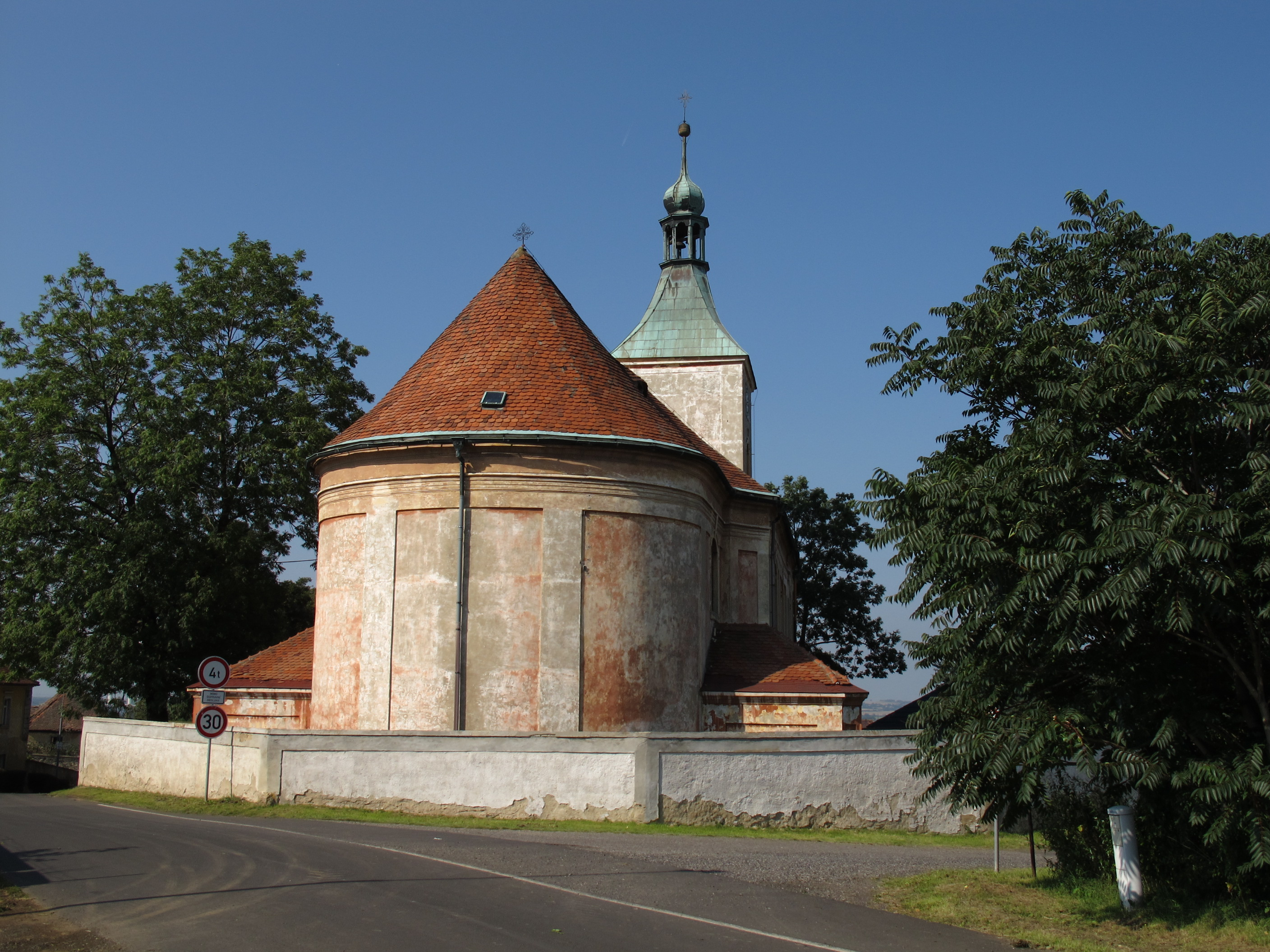 Kostel sv. Jiljí v Bečově, okres Most